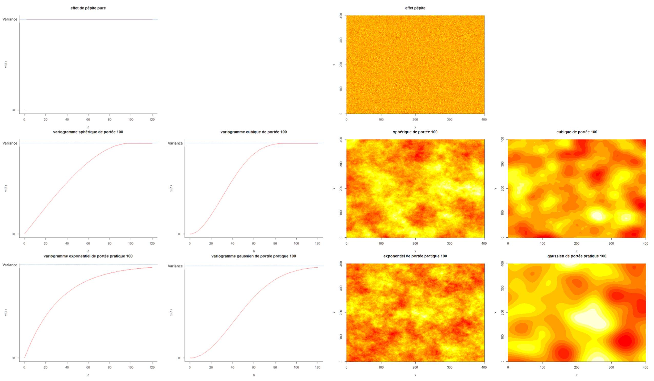 Cinq structures de variogrammes classiques et des simulation de processus stationnaires associés, sous R avec bibliothèque RandomFields.